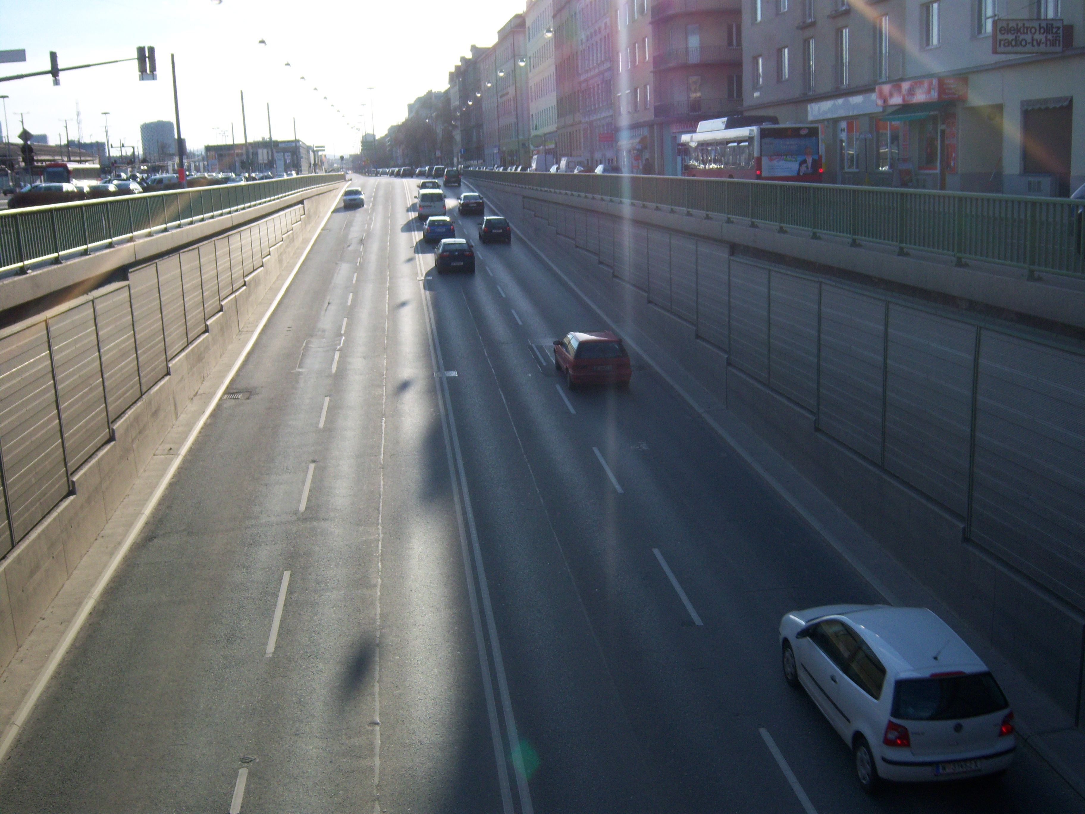 Wiedner Gürtel, Unterführung Südtiroler Platz